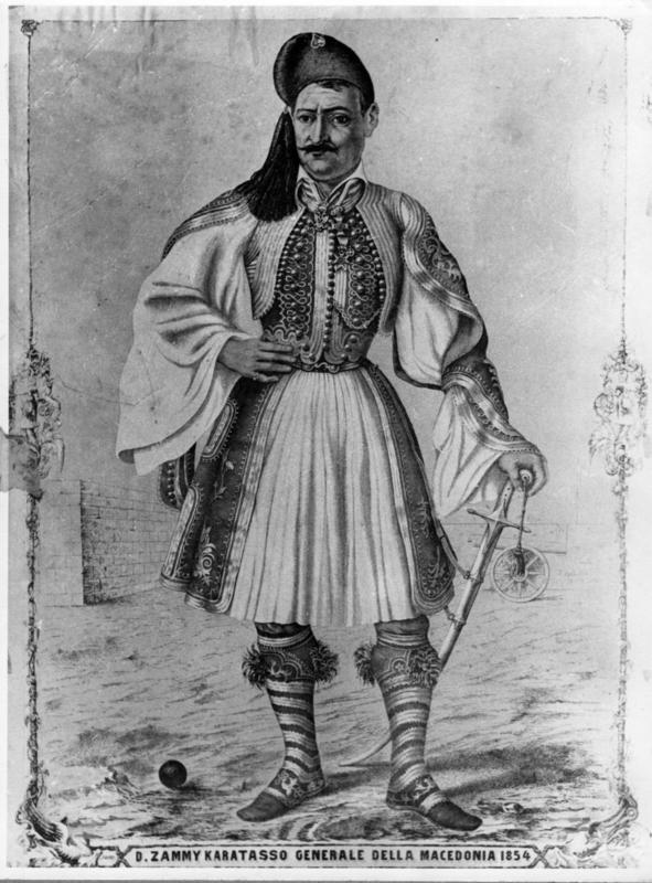 Димитриос Каратасос